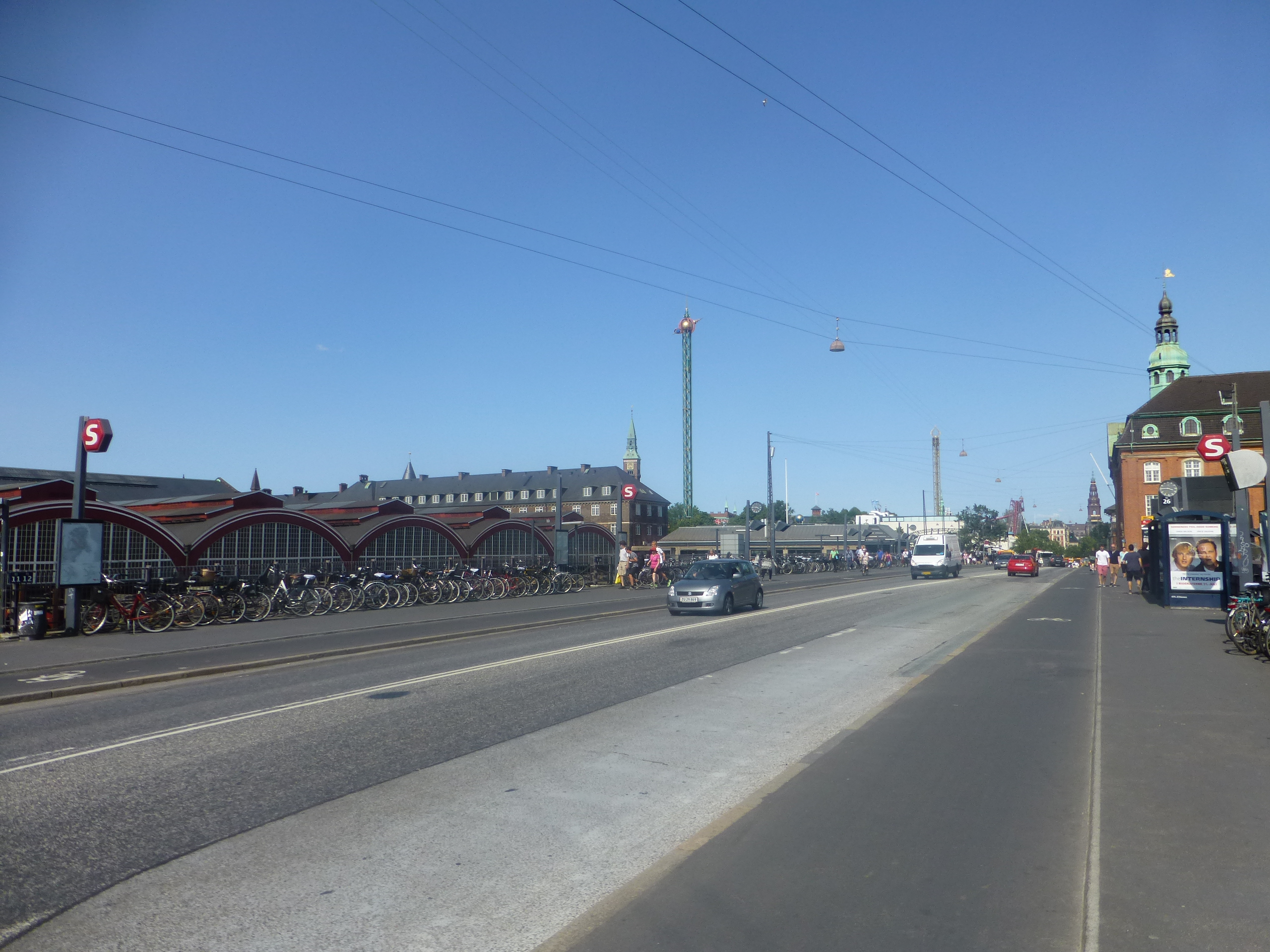 The bridge Tietgensbroen at Copenhagen Central Station.